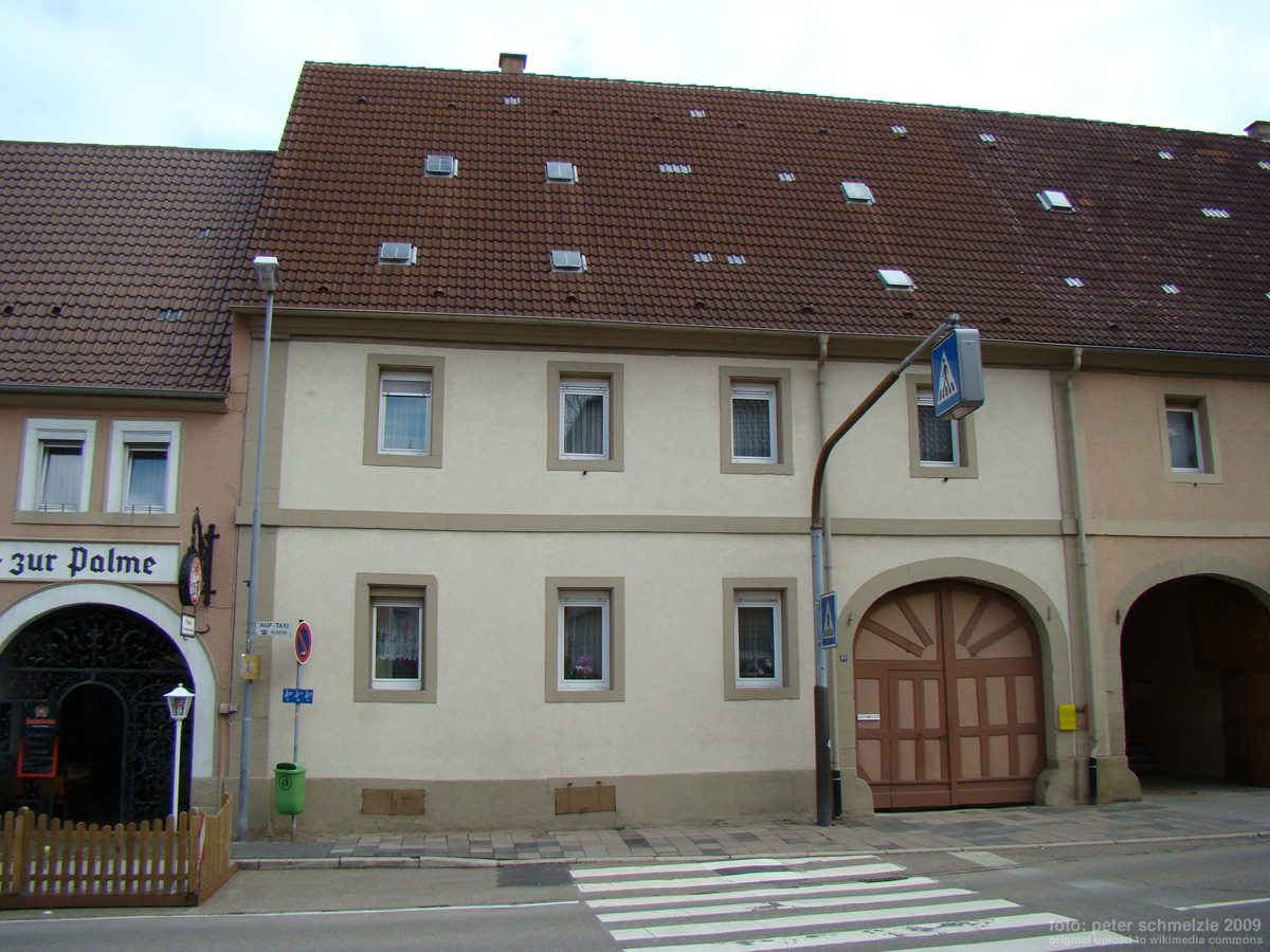 Historisches Gebäude Rappenauer Str. 8a in Eppingen